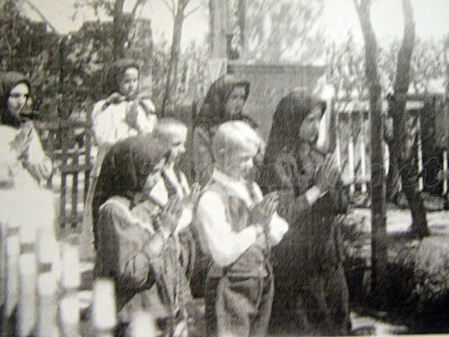 Svetište 1945.